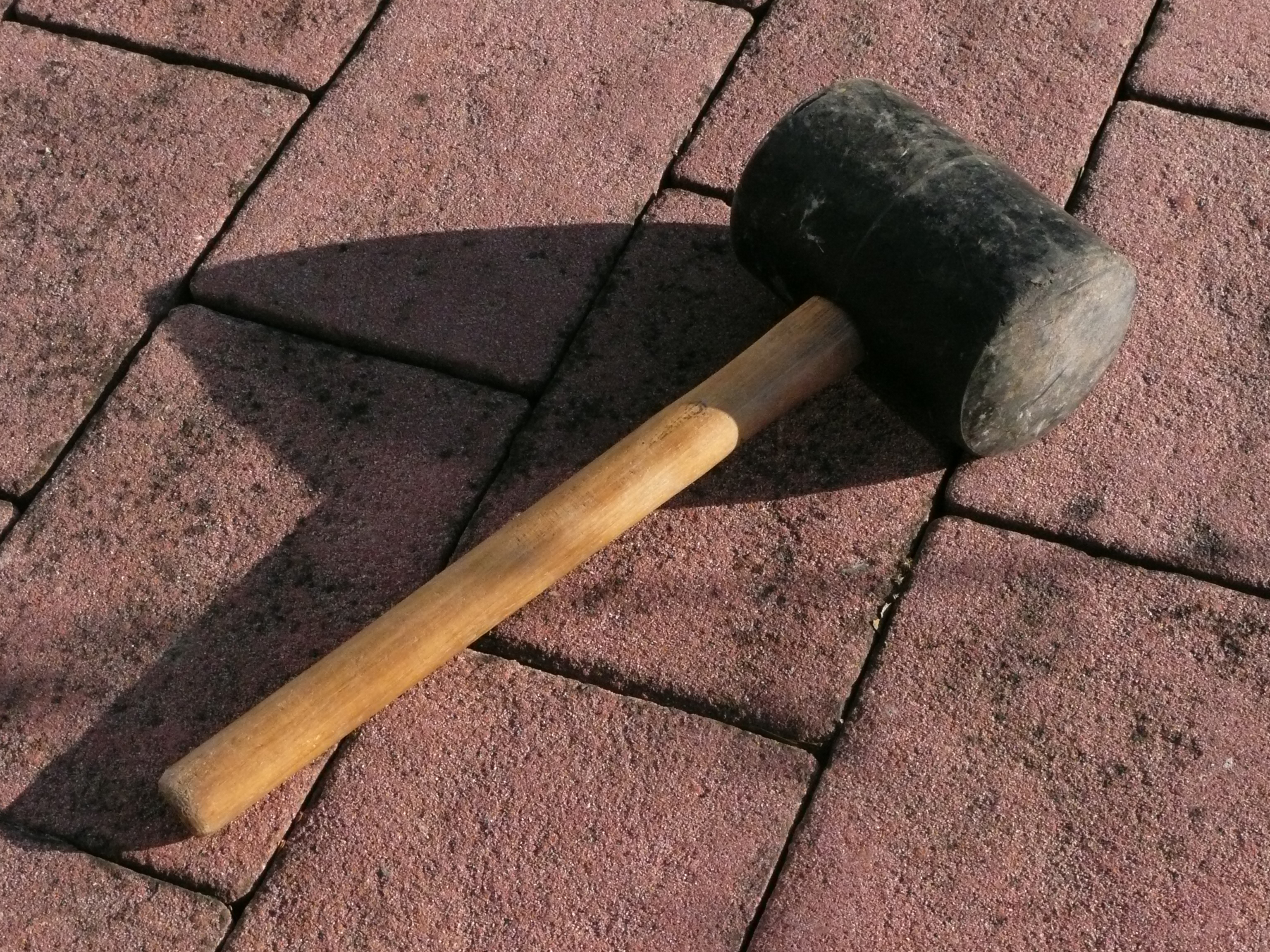 Gummihammer